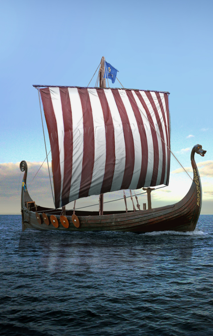 Le Gungnir sous voile